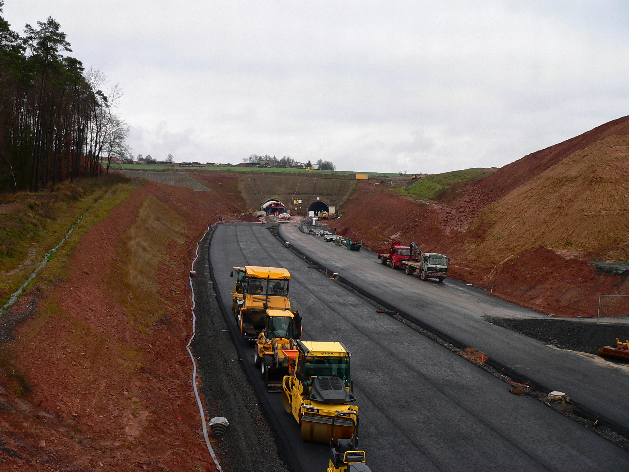 Bundesautobahn 49 - Tunnel Frankenhain bei Schwalmstadt-Treysa (Westseite) in Bau